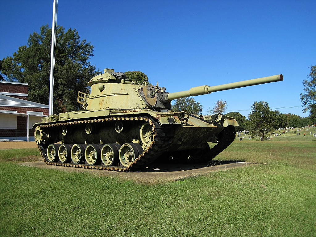 Batesville, Mississippi. VFW Post